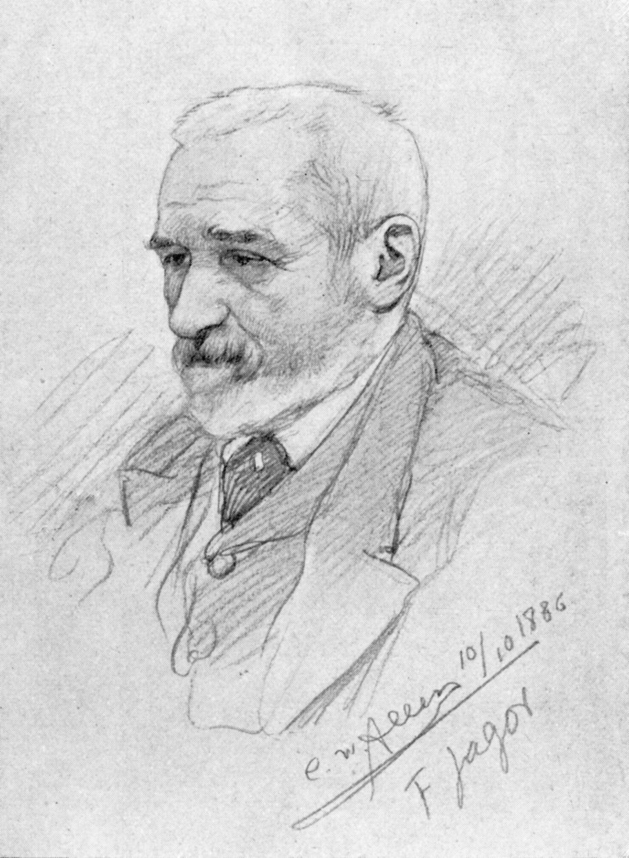 Portrait Fedor Jagor (Forschungsreisender)